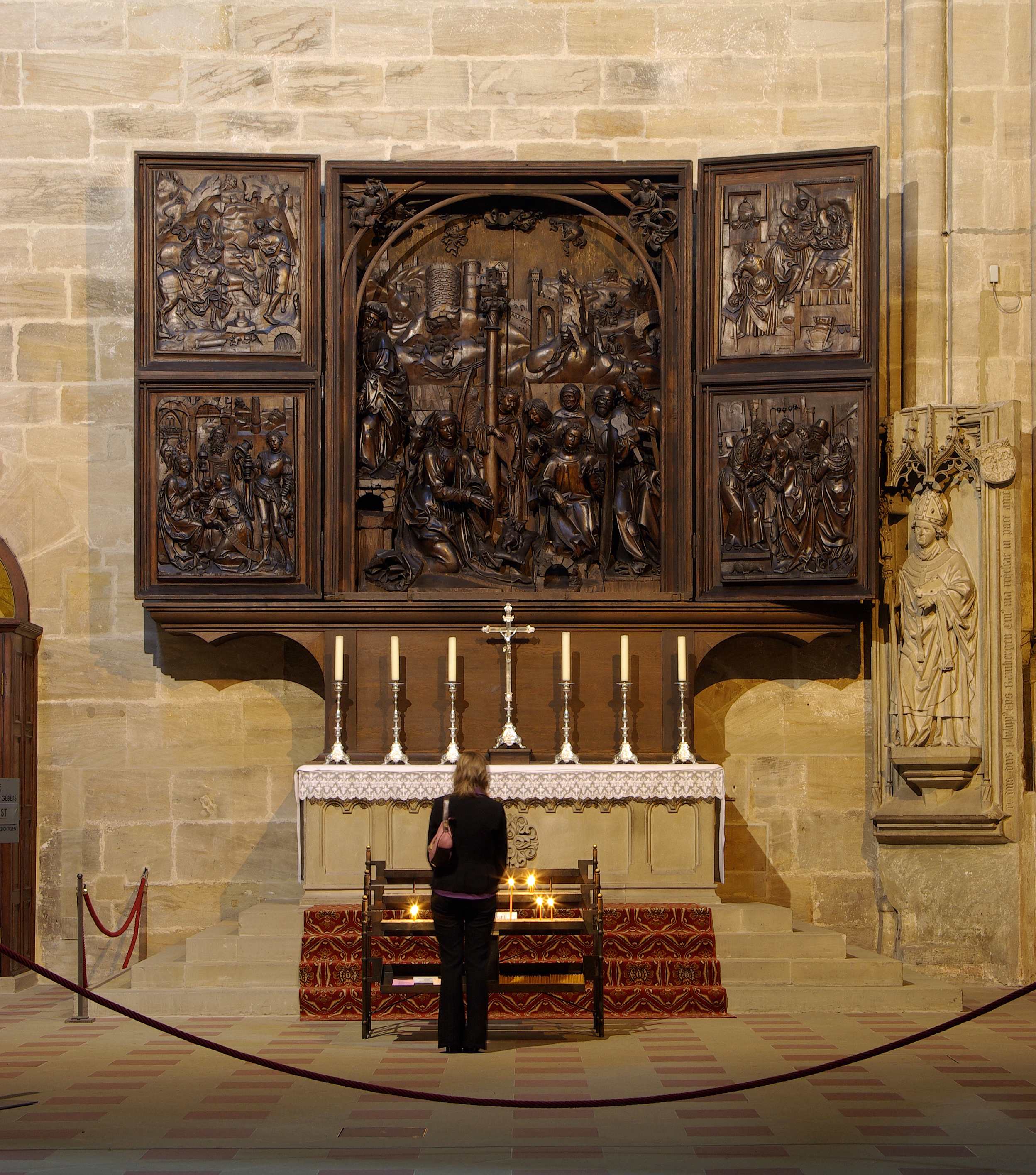 Bamberger Dom, Veit Stoß Altar